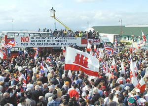 Massive demonstration in Gibraltar